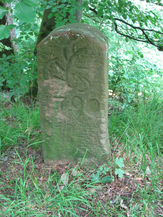 Grenzstein am Schanzenköpfle Hirschberg an der Bergstraße-Leutershausen